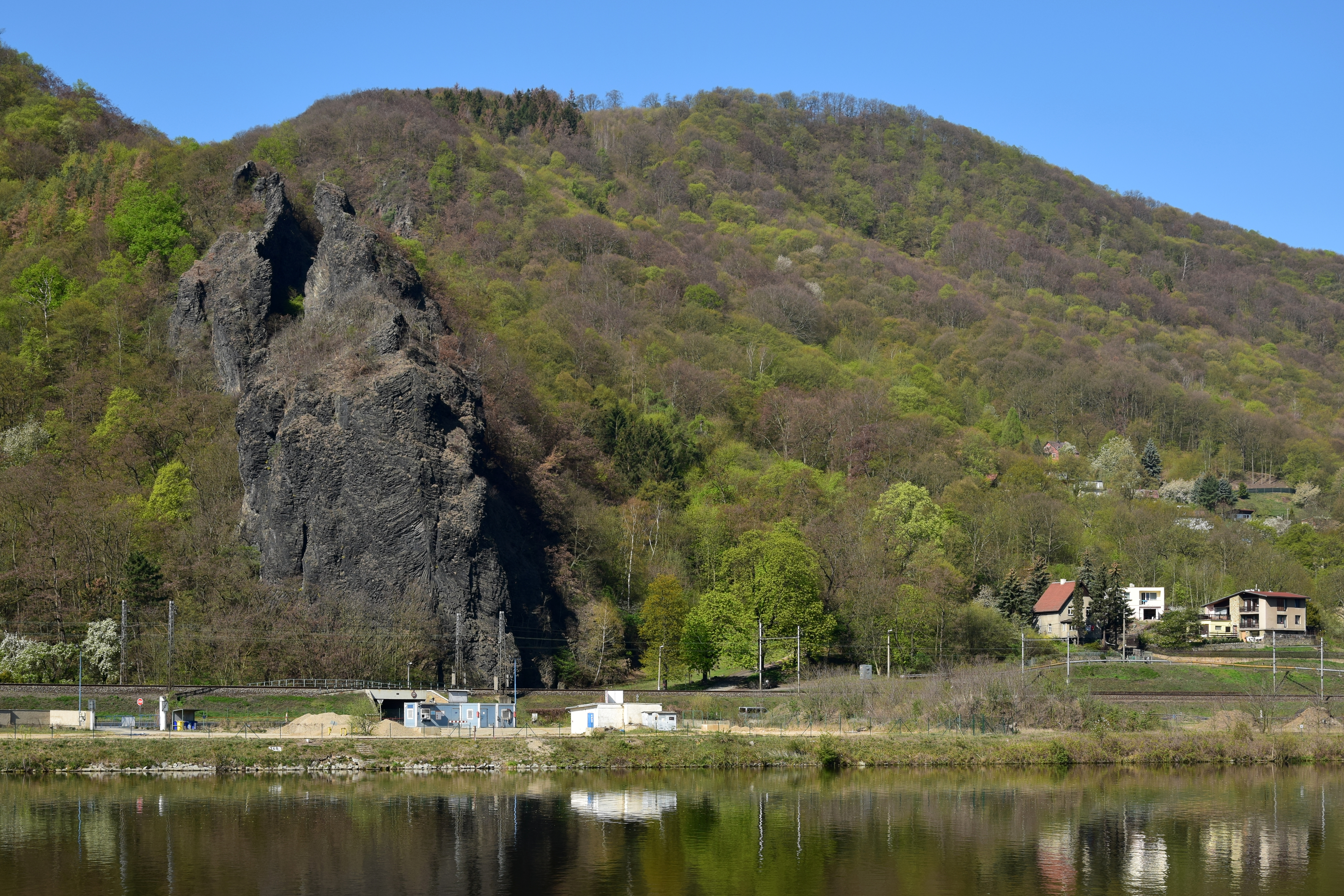 Vrkoč – celkový pohled z pravého břehu Labe